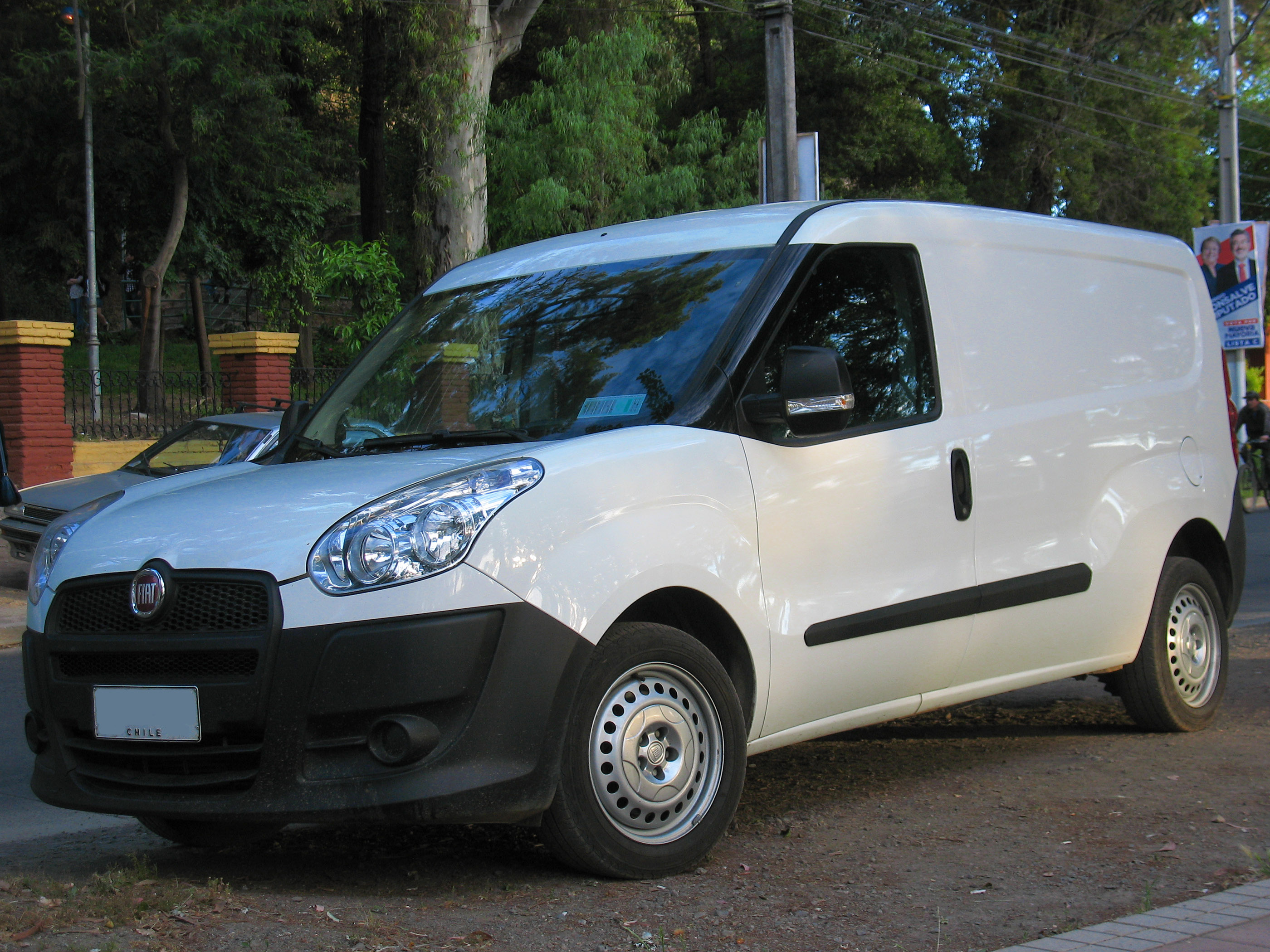 Fiat Doblo Maxi 90 2011